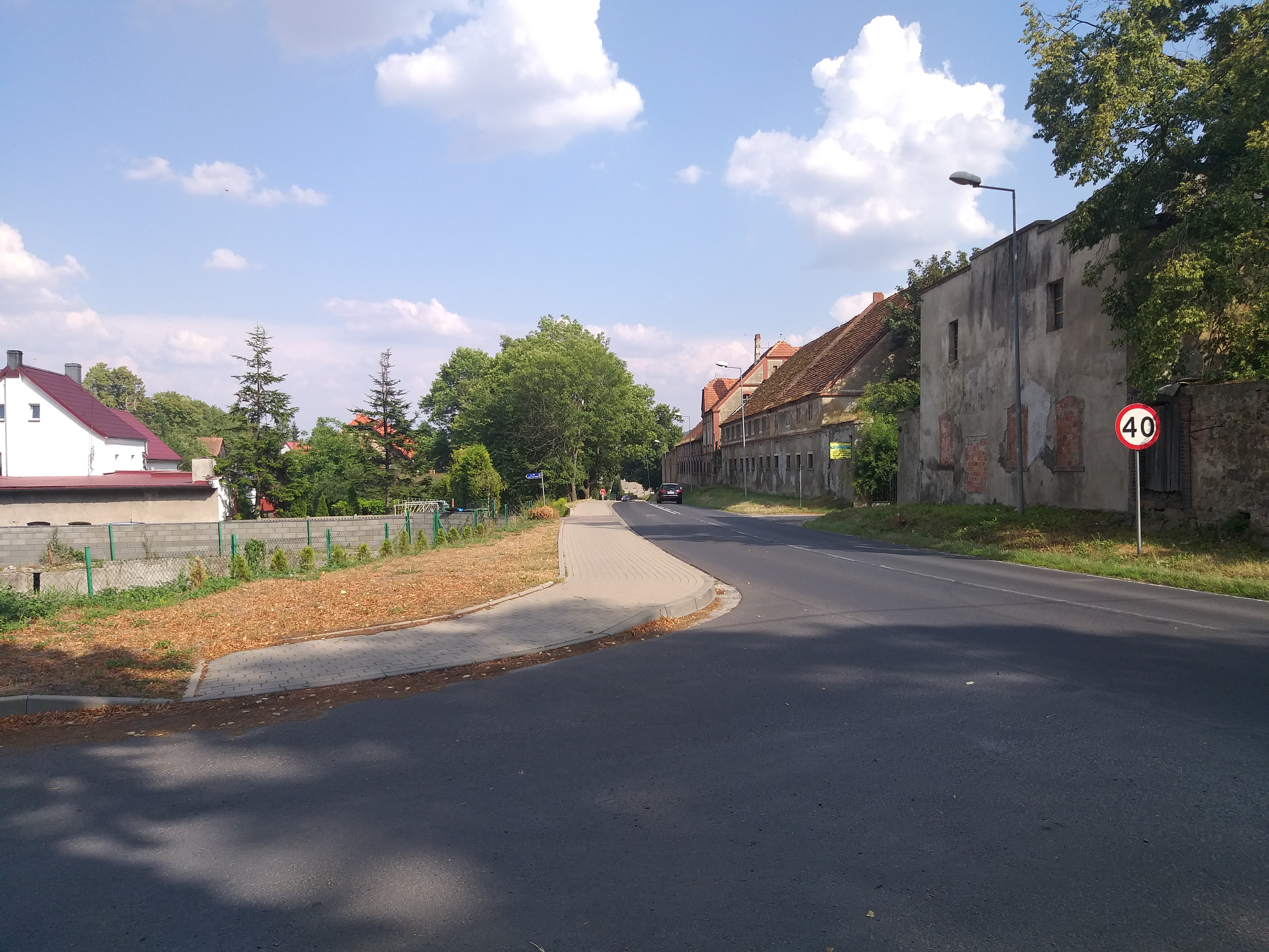 widok na budynki dawnego folwarku pałacowego (później PGR)